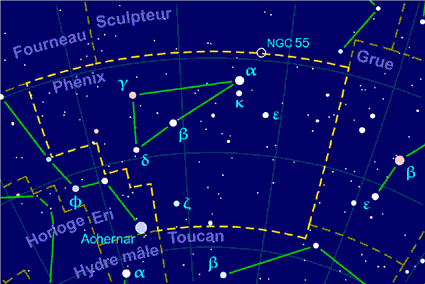 Carte pour la constellation Phénix Produite à l'aide du logiciel PP3